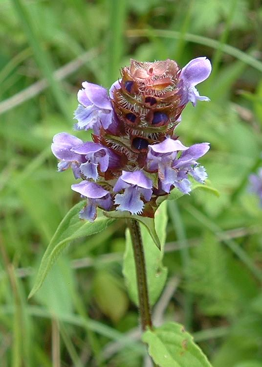 Brunelle commune, photo , Bucey-lès-Gy, Juin 2004